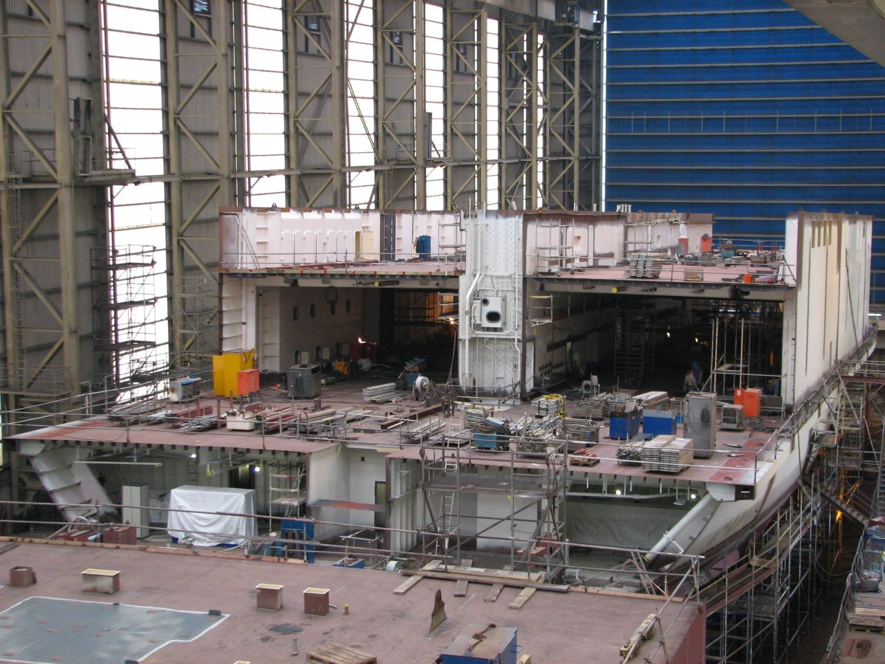 Flensburger Schiffbau Gesellschaft